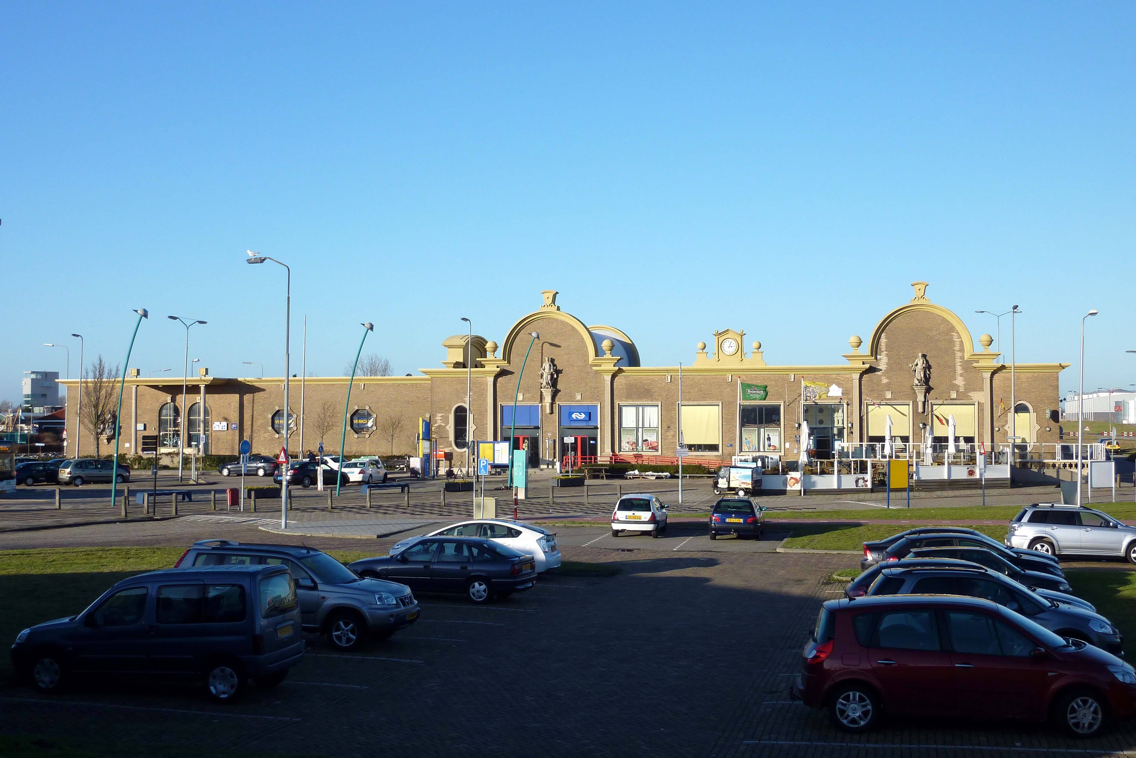 Spoorwegstation van Vlissingen (1950) ontworpen door Sybold van Ravesteyn.